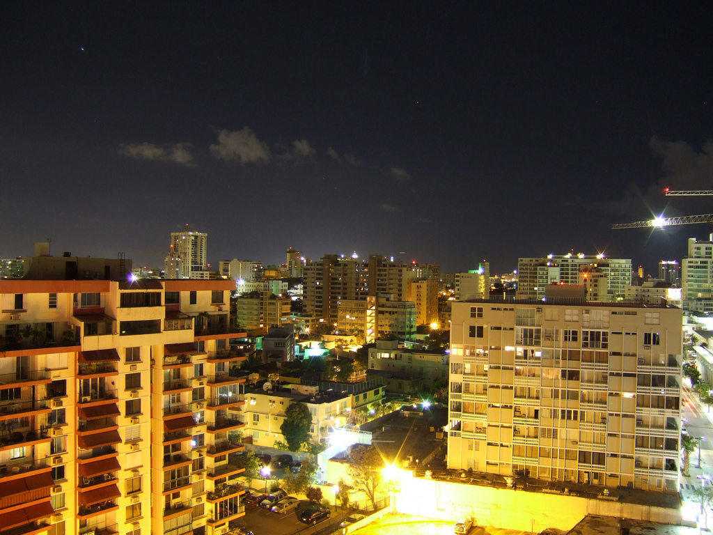 San Juan, Puerto Rico